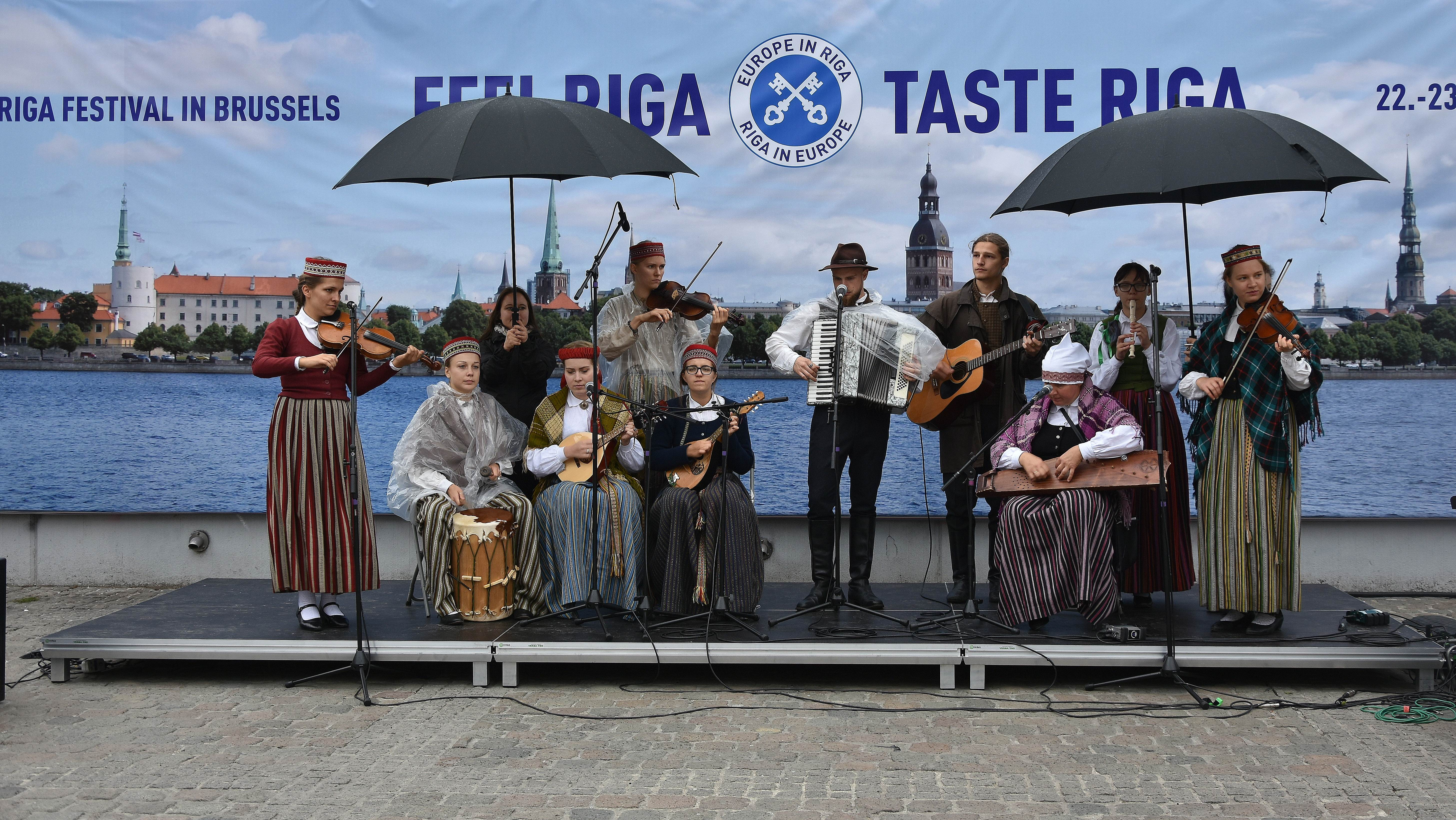 Rigafestival in Brussel 22-09-2018 op het Spanjeplein